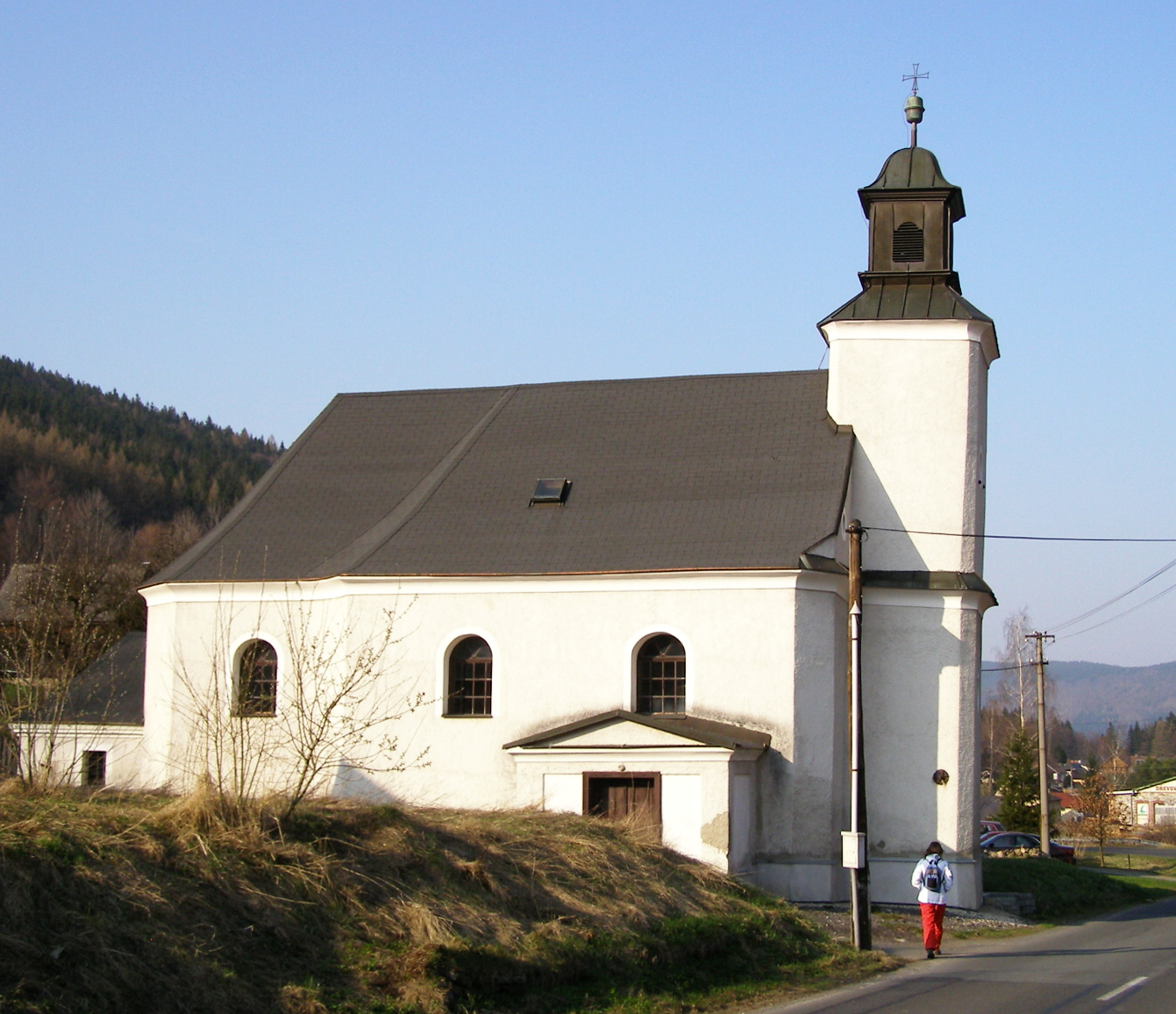 Ludvíkov - kostel Navštívení Panny Marie se šikmou věží